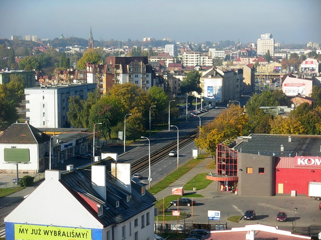 Widok z biurowca przy ul. Jagiellońskiej w Bydgoszczy